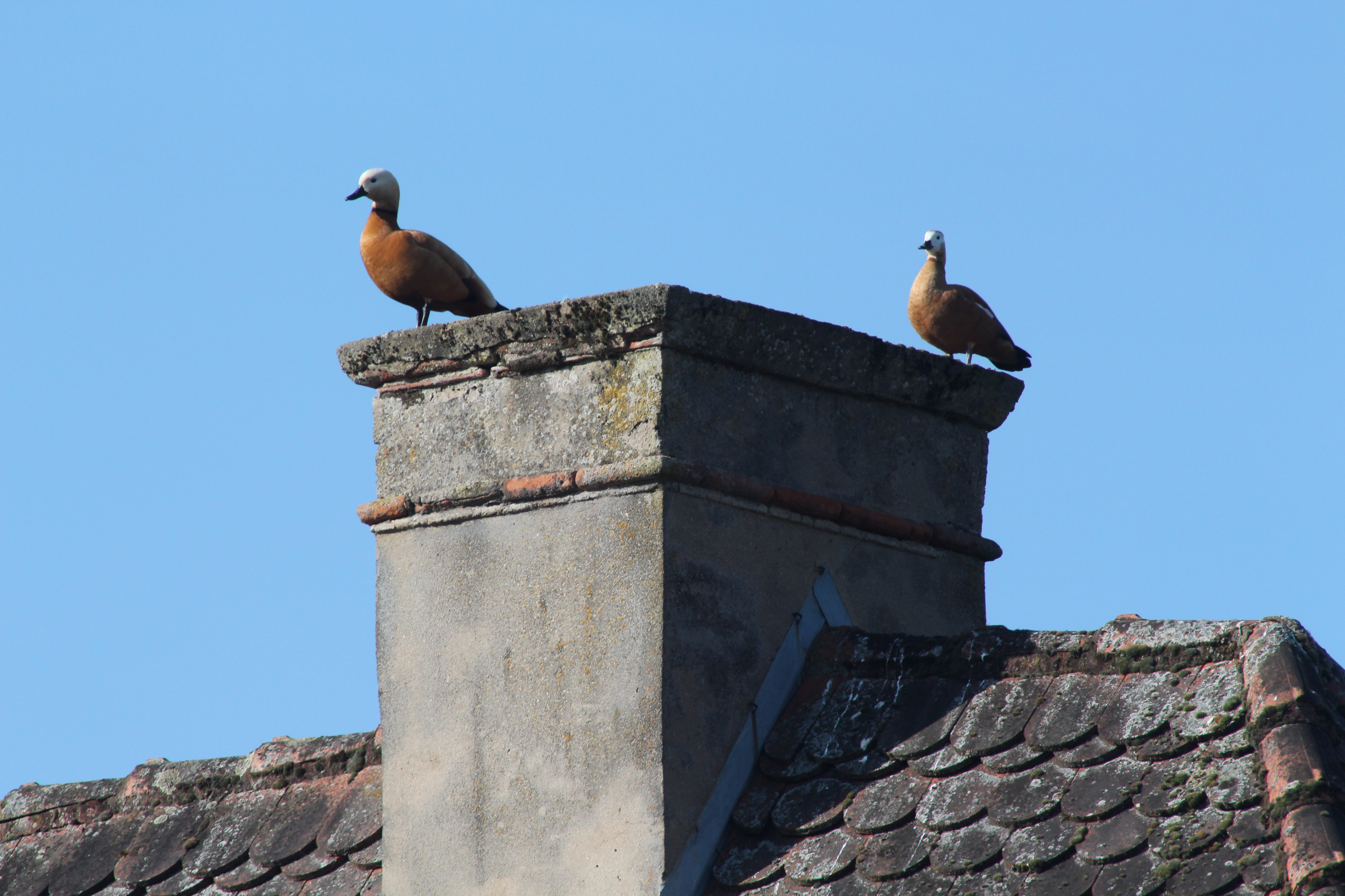 Zwei Rostgänse auf einem Kamin